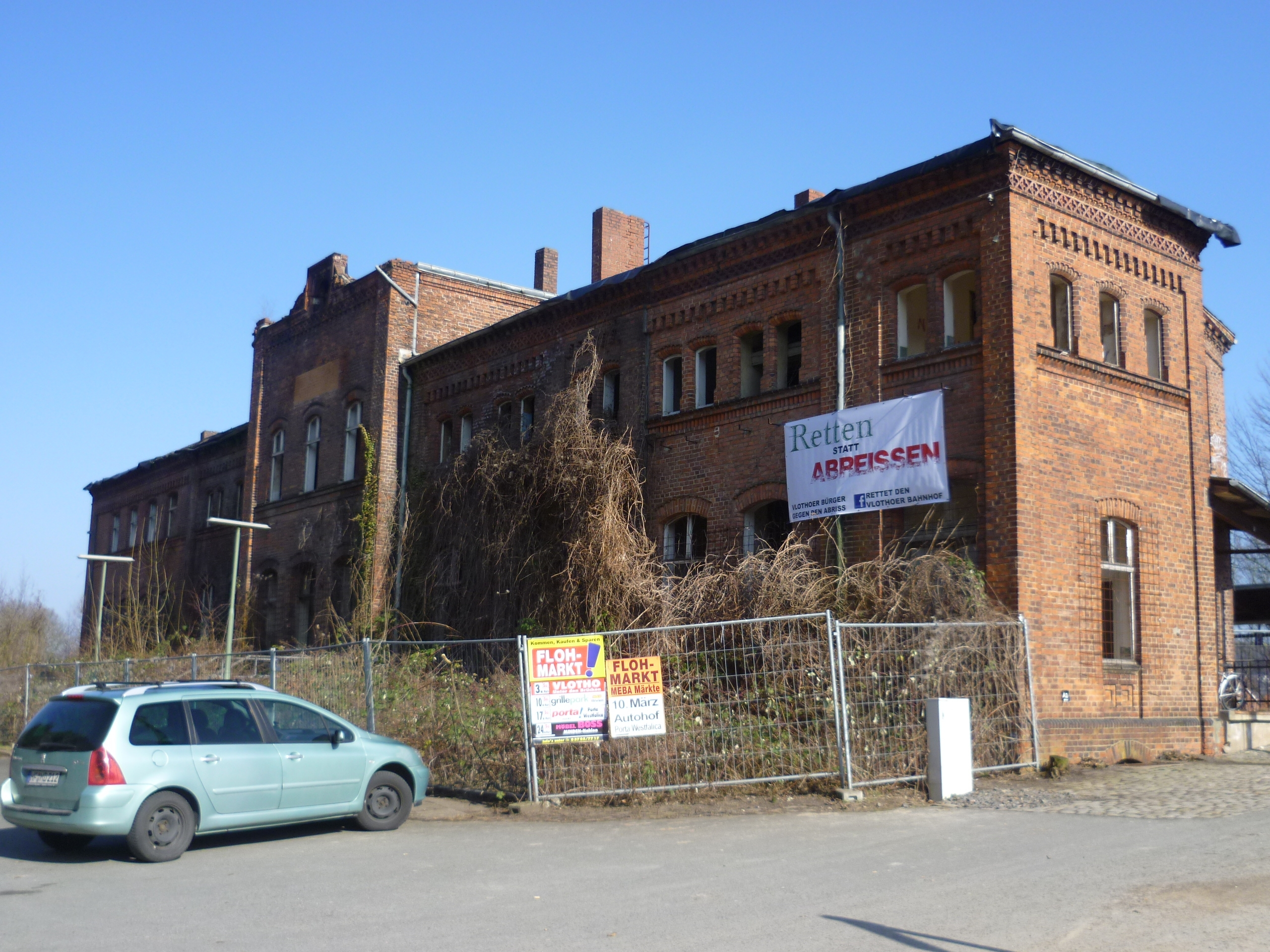 Bahnhof Vlotho von Südwesten.